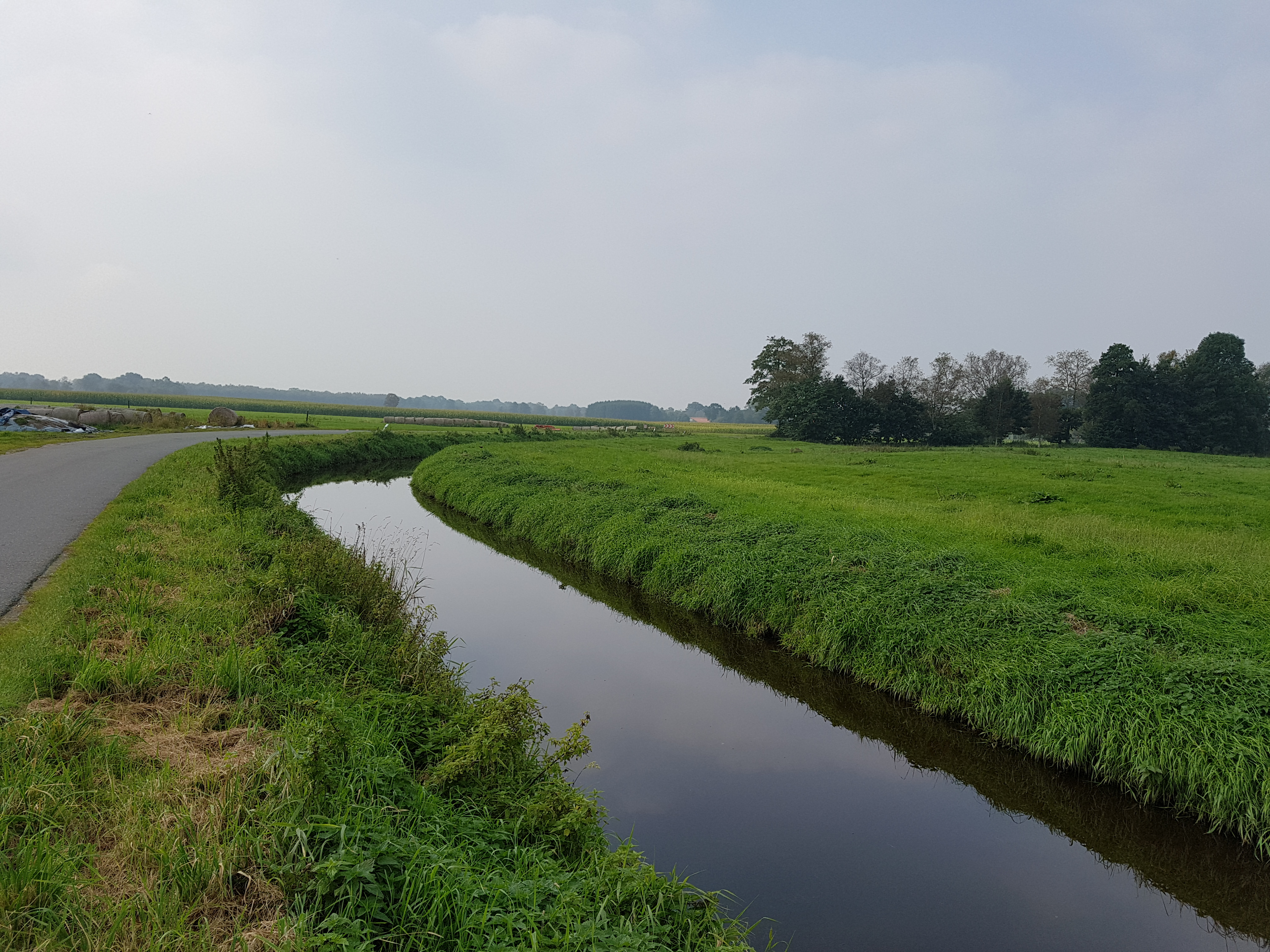 Ihlbeker Kanaal bi Ihlbeek